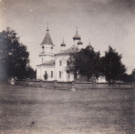 Беларуская (тарашкевіца): Моталь (Motal), пляц Рынак (plac Rynak). Царква-мураўёўка